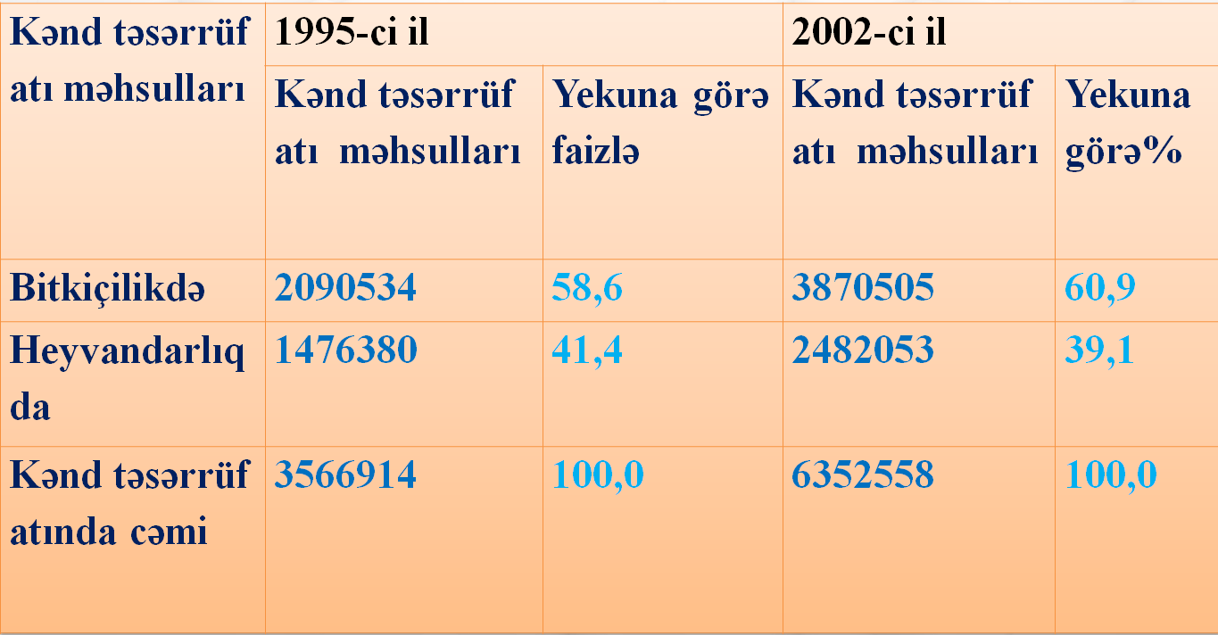 Qurluş nisbi kəmiyyəti